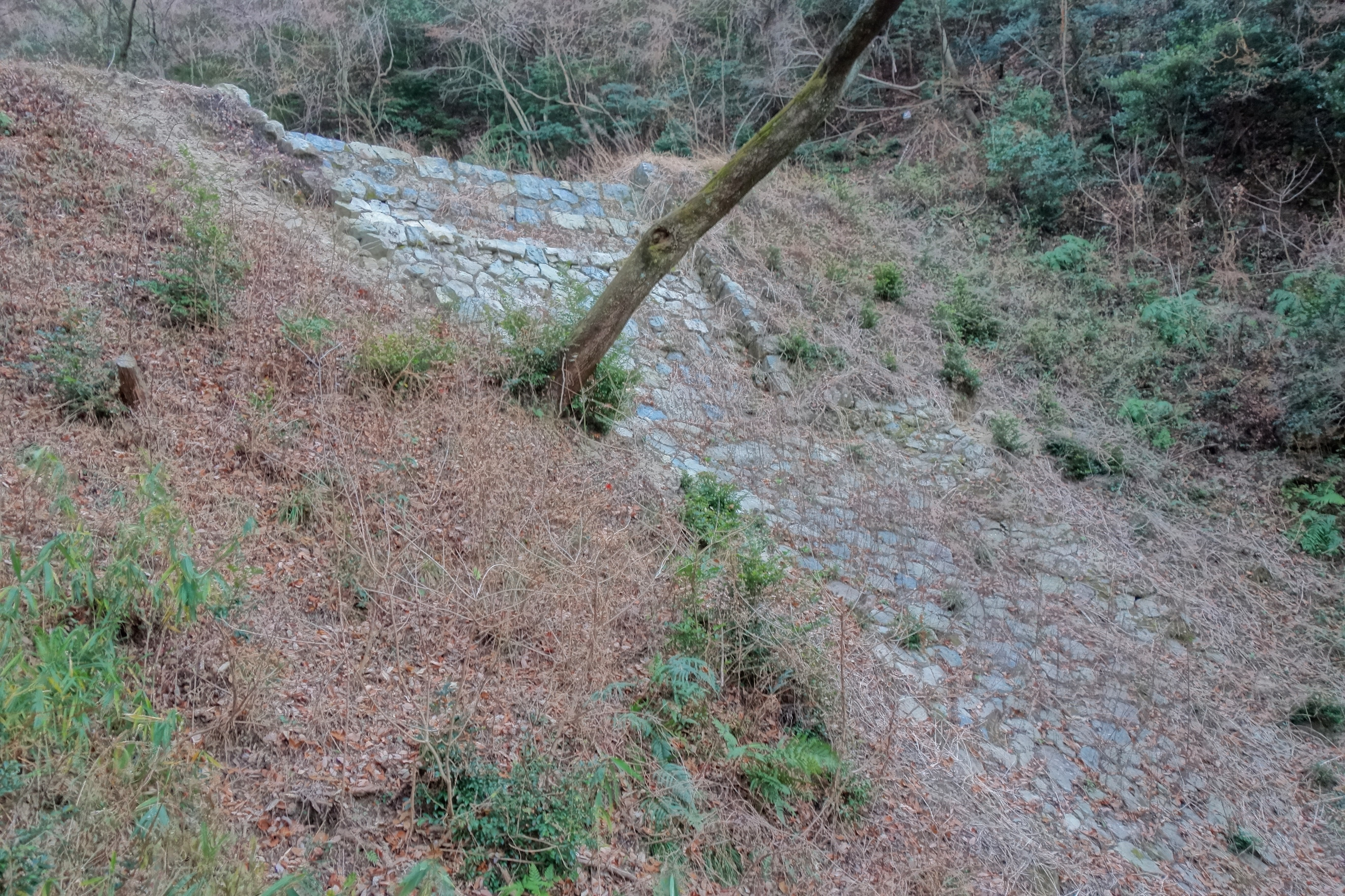 広島県福山市芦田町の別所砂留の13番砂留